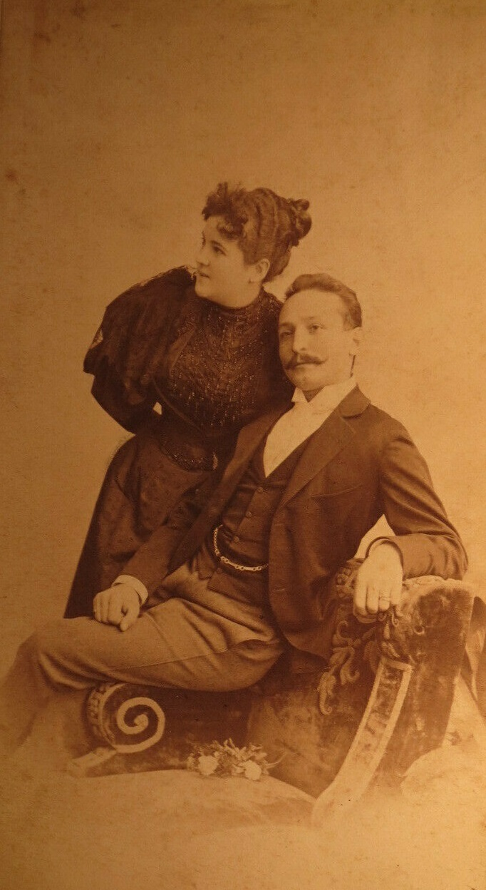 Szalády Géza (1864–?), a Rác gyógyfürdő igazgatósági gondnoka és első felesége, Rendessy Olga